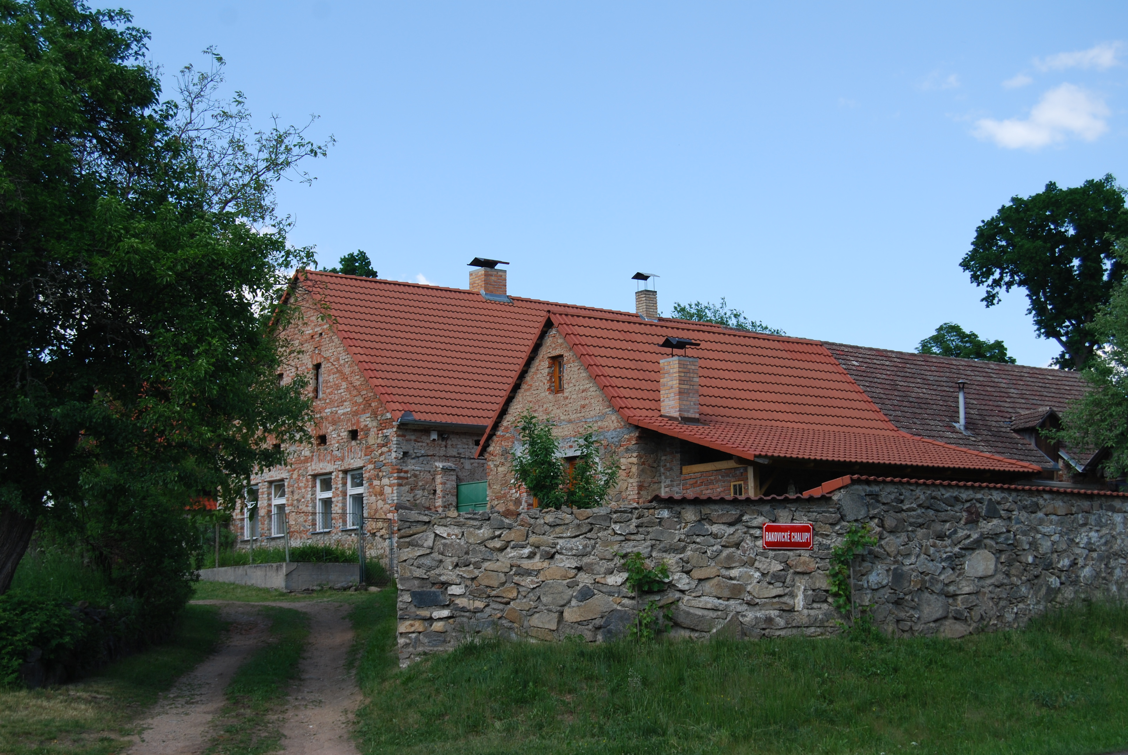 Rakovické Chalupy je malá vesnice, část města Mirotice v okrese Písek. Česká republika.